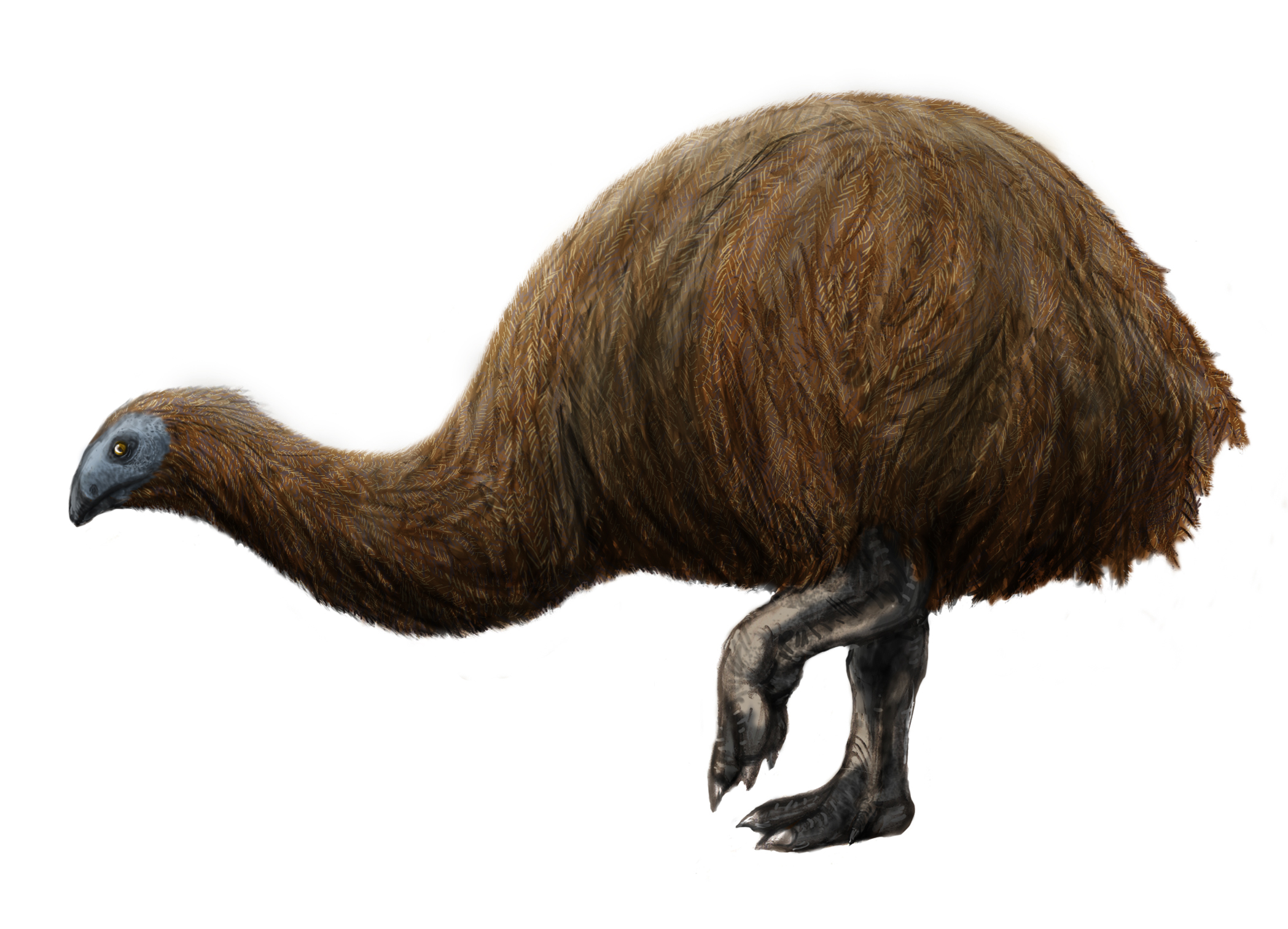 Euryapteryx gravis (curtus).